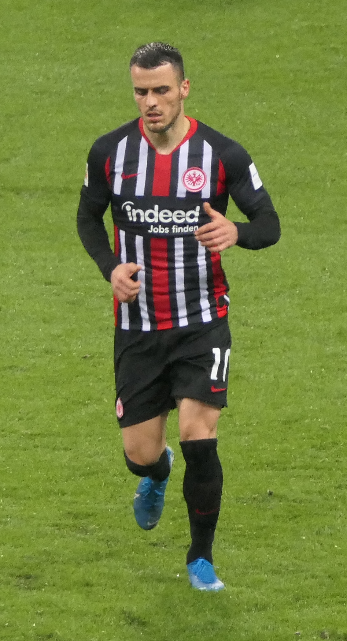 Der Fussballprofi Filip Kostić im Trikot von Eintracht Frankfurt beim Heimspiel gegen den SV Werder Bremen am 06.10.2019.